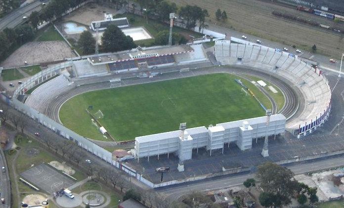 foto aérea da vila capanema